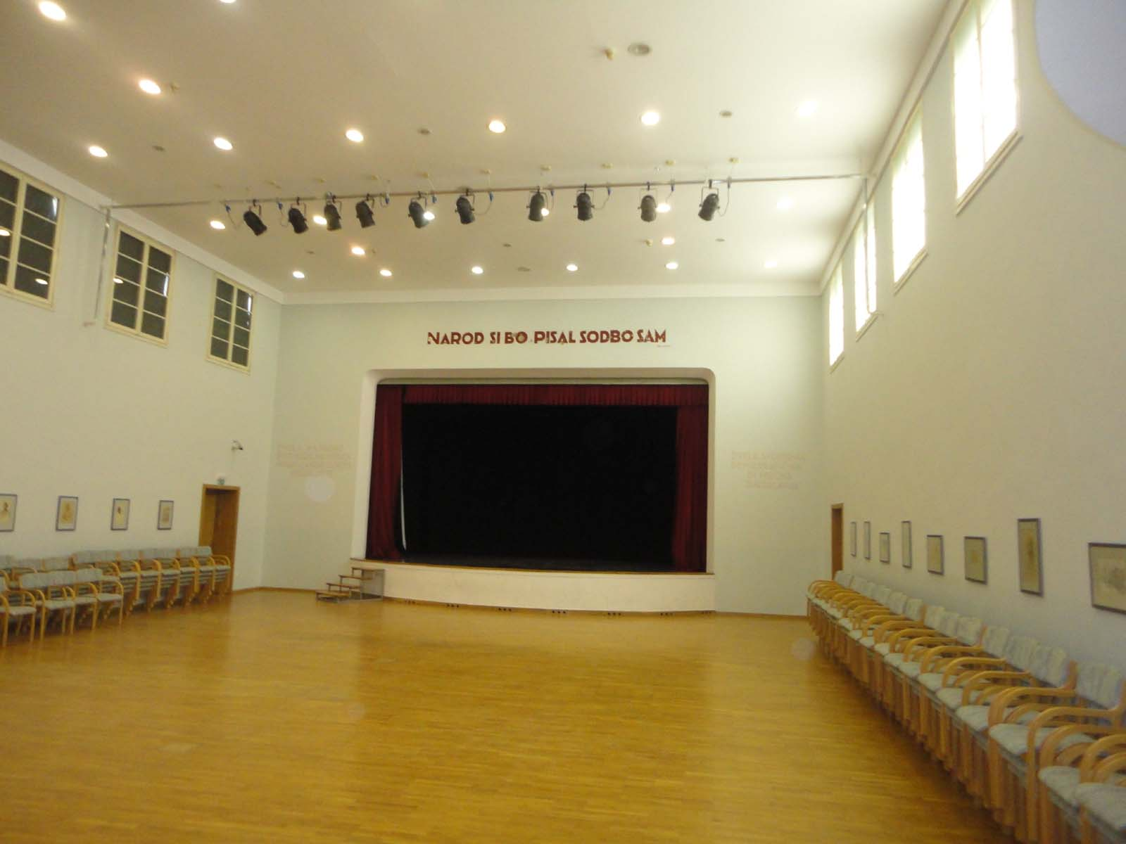 Pokrajinski muzej Kočevje (PMK): dvorana, kjer se je sestajal Zbor odposlancev slovenskega naroda